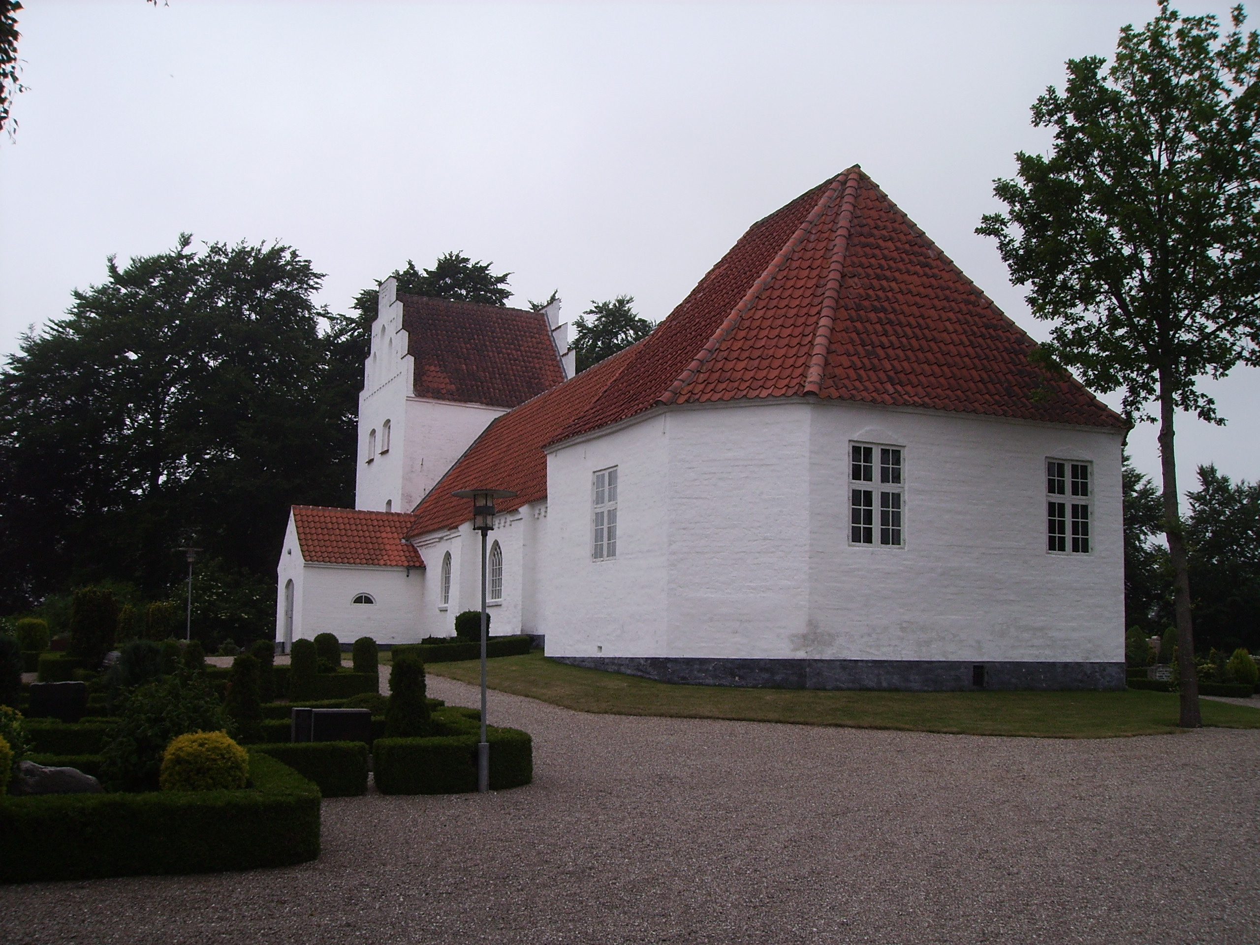 Nørre Søby Kike, Nørre Søby Sogn, Åsum Herred, Odense Amt, Denmark (Danish Church)